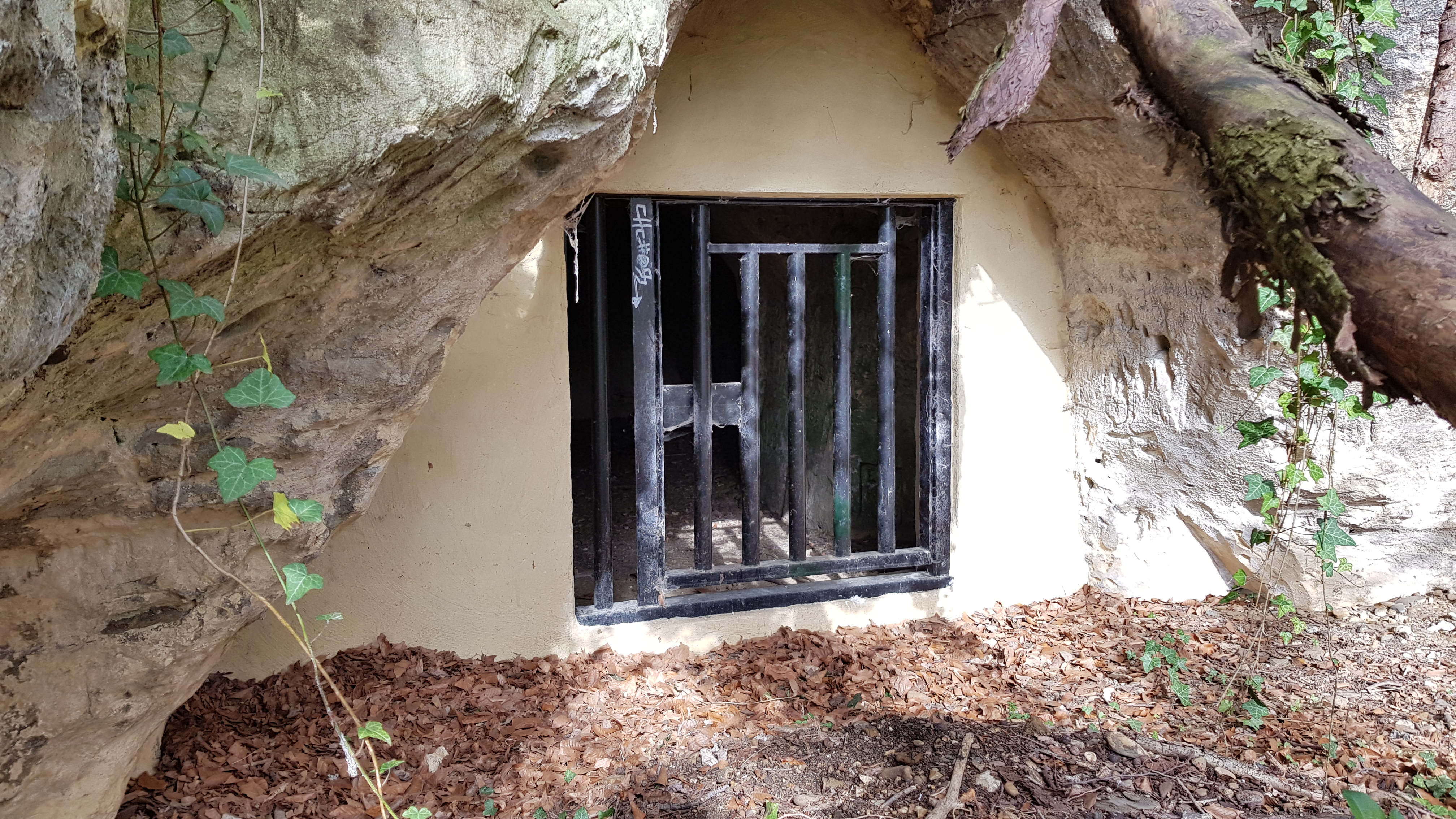 Mosterdberggroeve Zuid, Cadier en Keer, Nederland